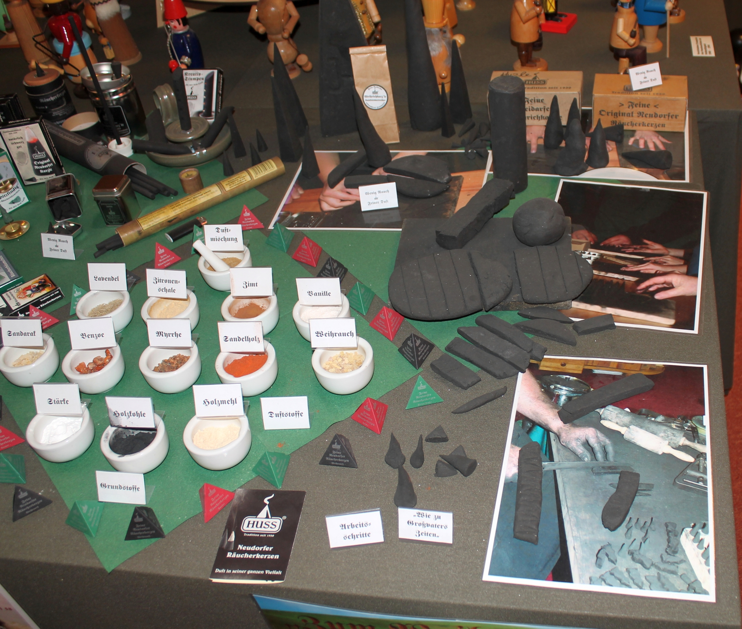 Arbeitsschritte der Räucherkerzchenherstellung im Räuchermännchenmuseum Crottendorf, Sachsen, Deutschand.